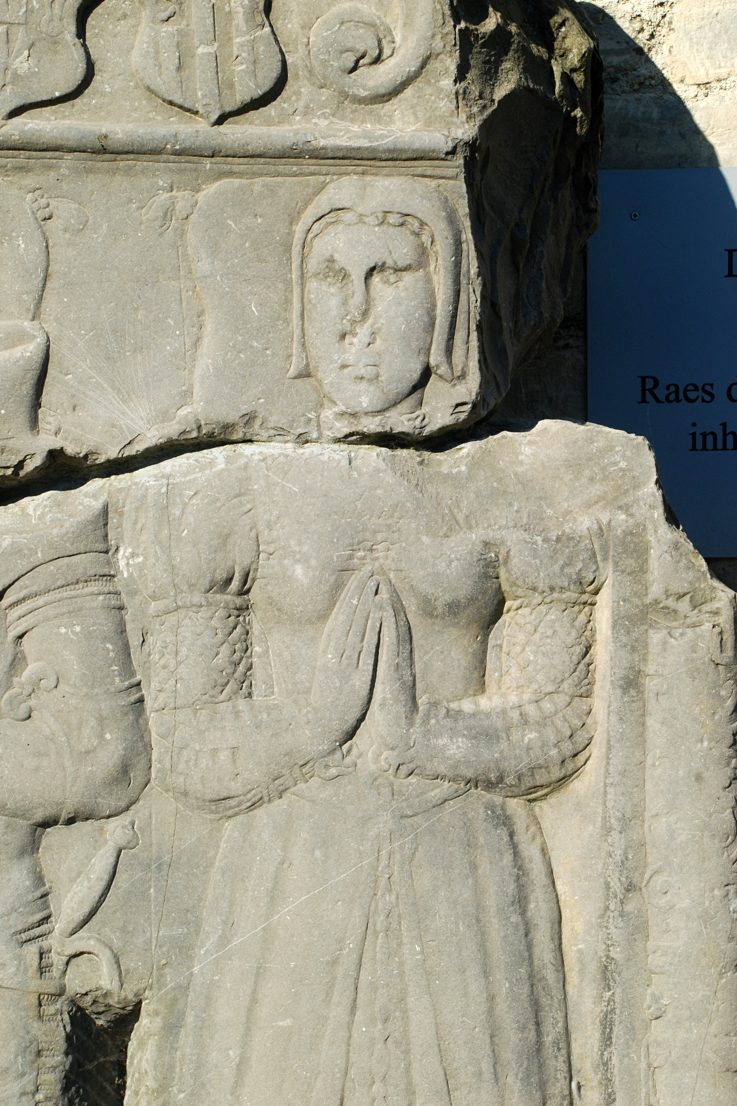 Belgique - Brabant wallon - Jodoigne - Saint-Remy-Geest - Église Saint-Remy